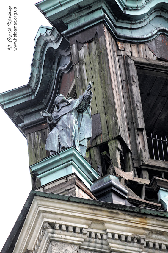 Монастир походження дерева хреста Господнього (колишній домініканський монастир та костел Внебовзяття Пресвятої Діви Марії) в Підкамені